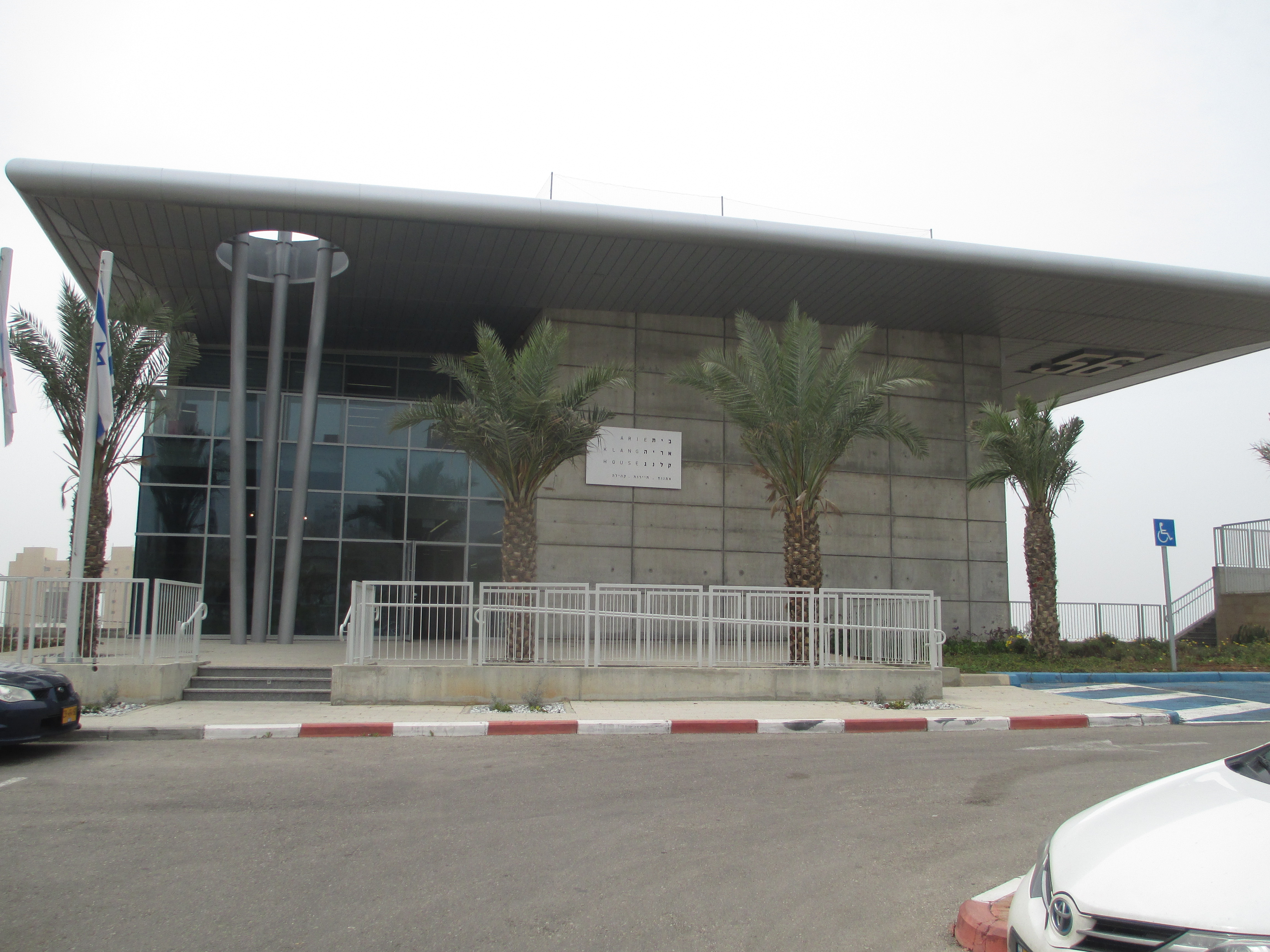 בית האמנים על שם אריה קלנג באשדוד